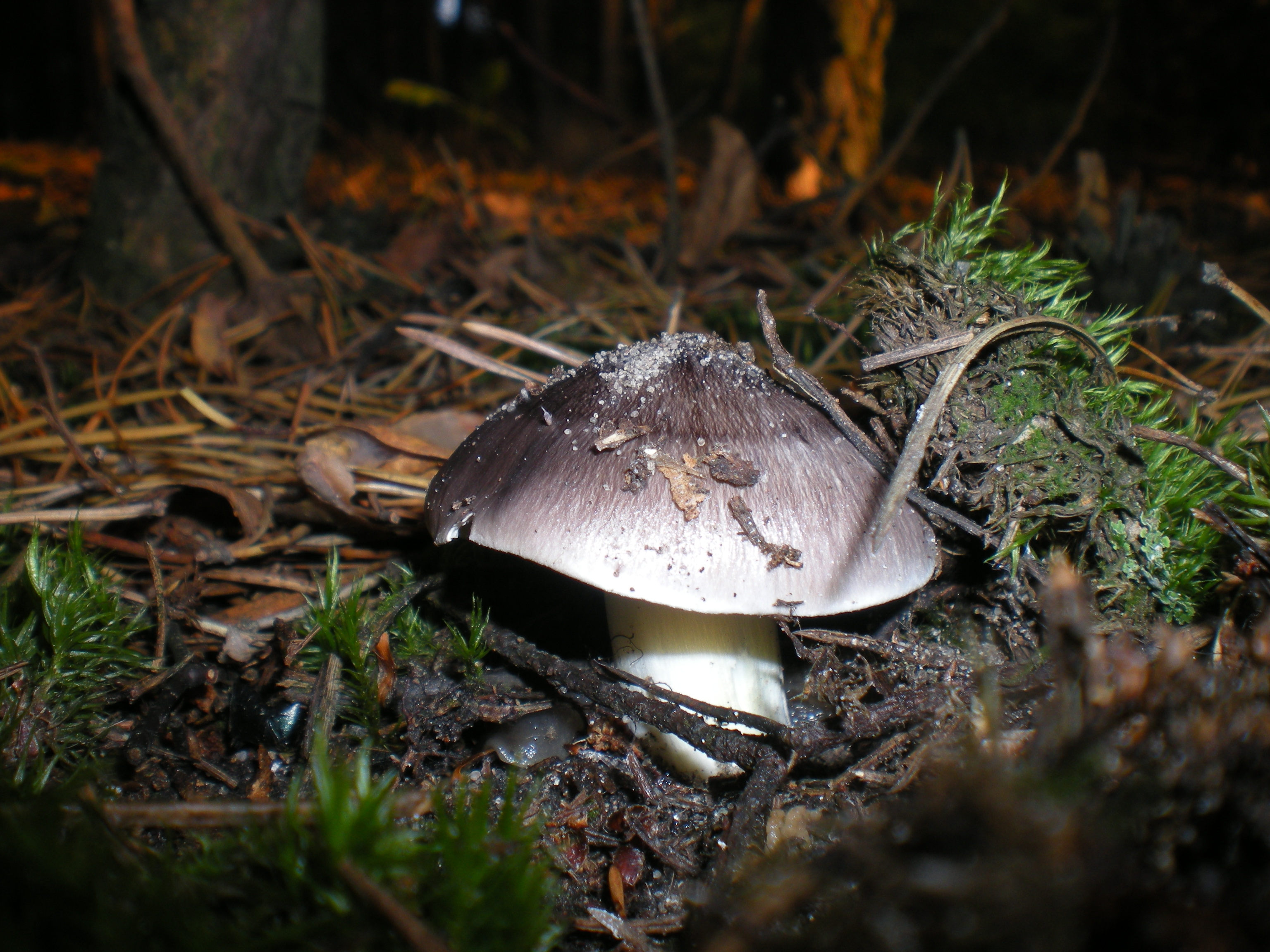 Gąska niekształtna